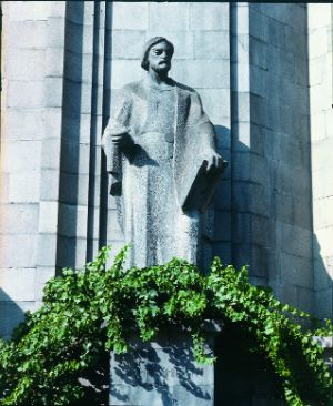 Торос Рослин, великий армянскомий художник-миниатюрист киликийской школы 13 века